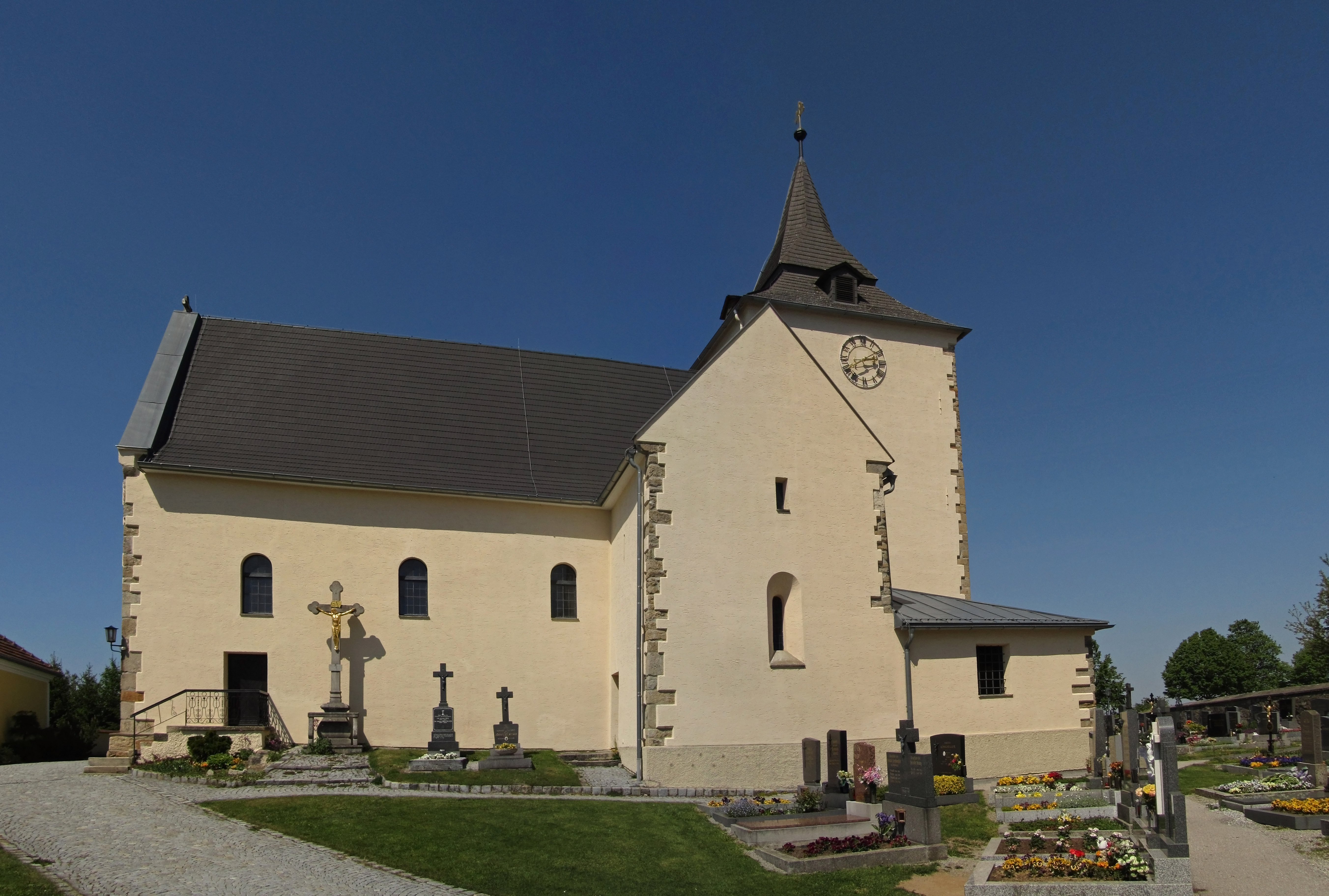 Kath. Pfarrkirche hl. Jakobus der Ältere und Friedhof in Echsenbach